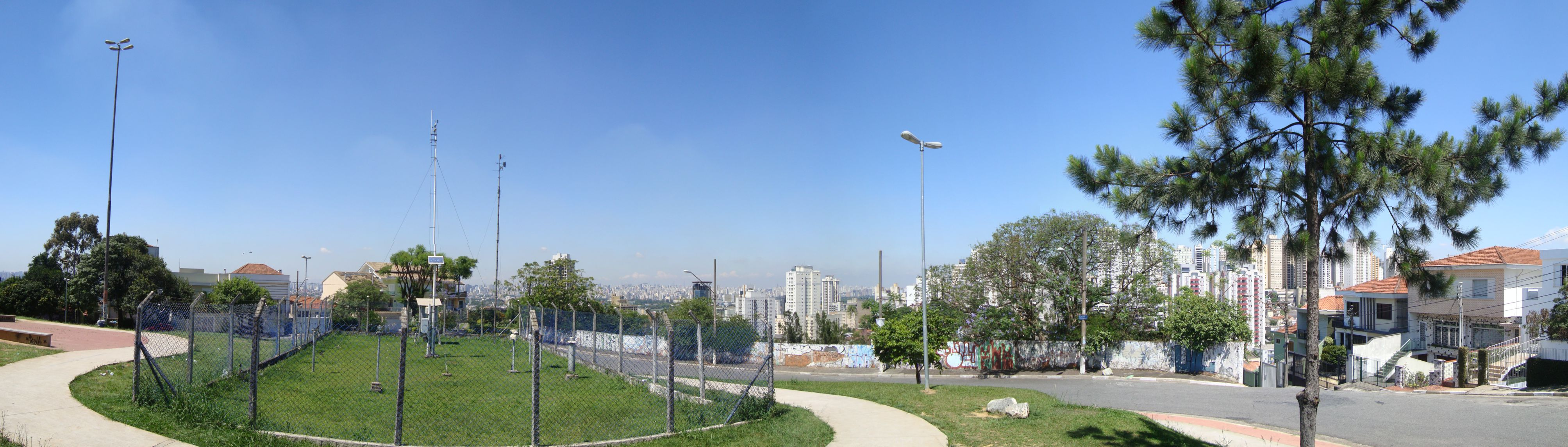 Foto panorâmica do Mirante de Santana, localizado no Jardim São Paulo, zona norte da cidade de São Paulo